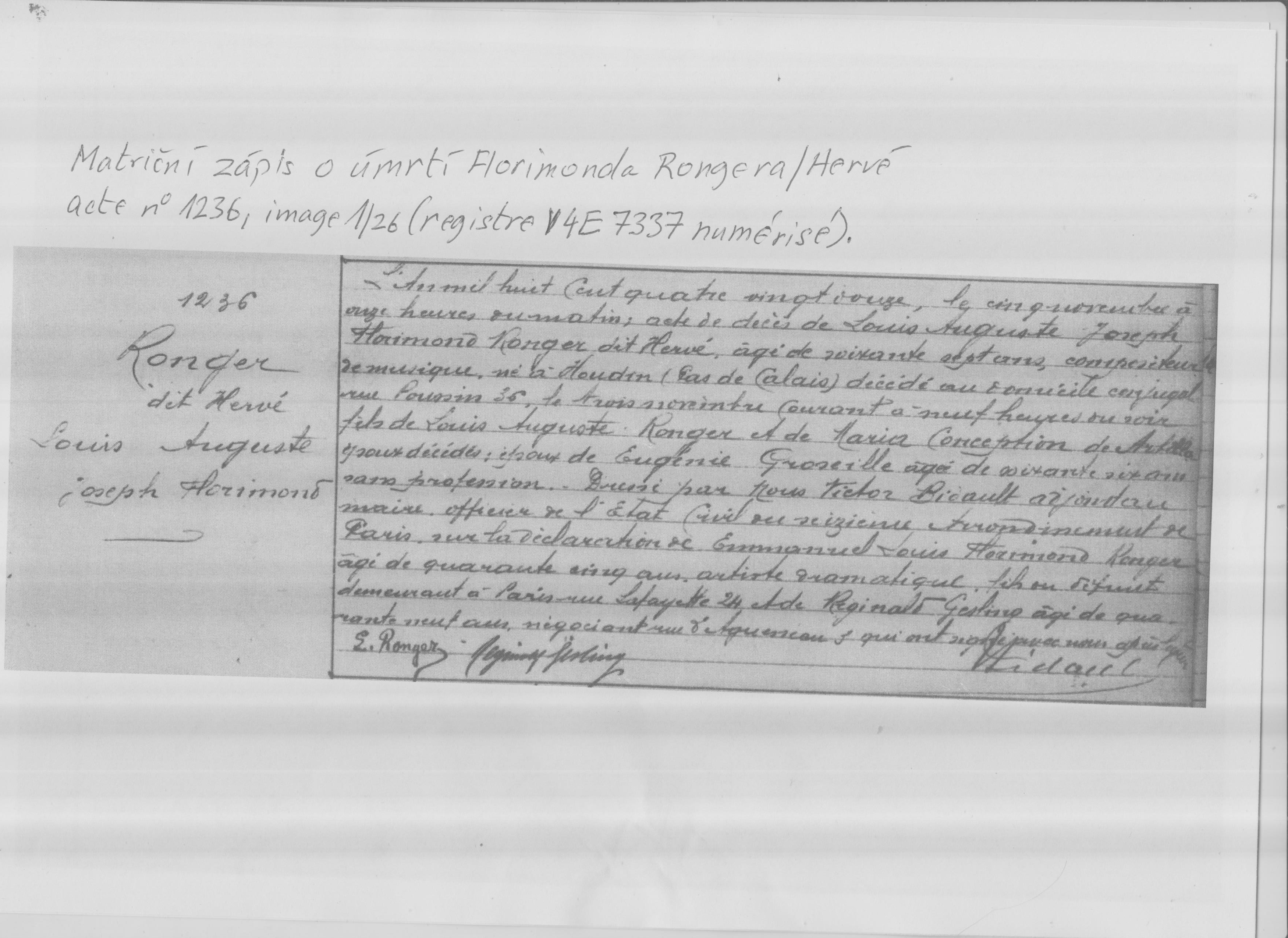 Hervé-smrt-matrika